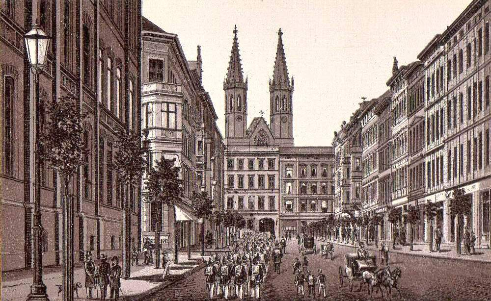 Ulrichskirche Wilhelmstrasse Magdeburg Zeichnung um 1830